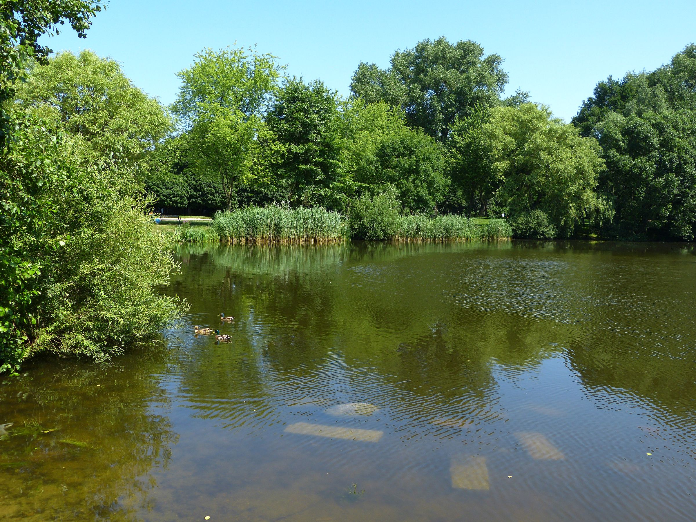 Das Horner Moor ist ein kleiner Teich im Hamburger Stadtteil Horn und Namensgeber der gleichnamigen Rennbahn